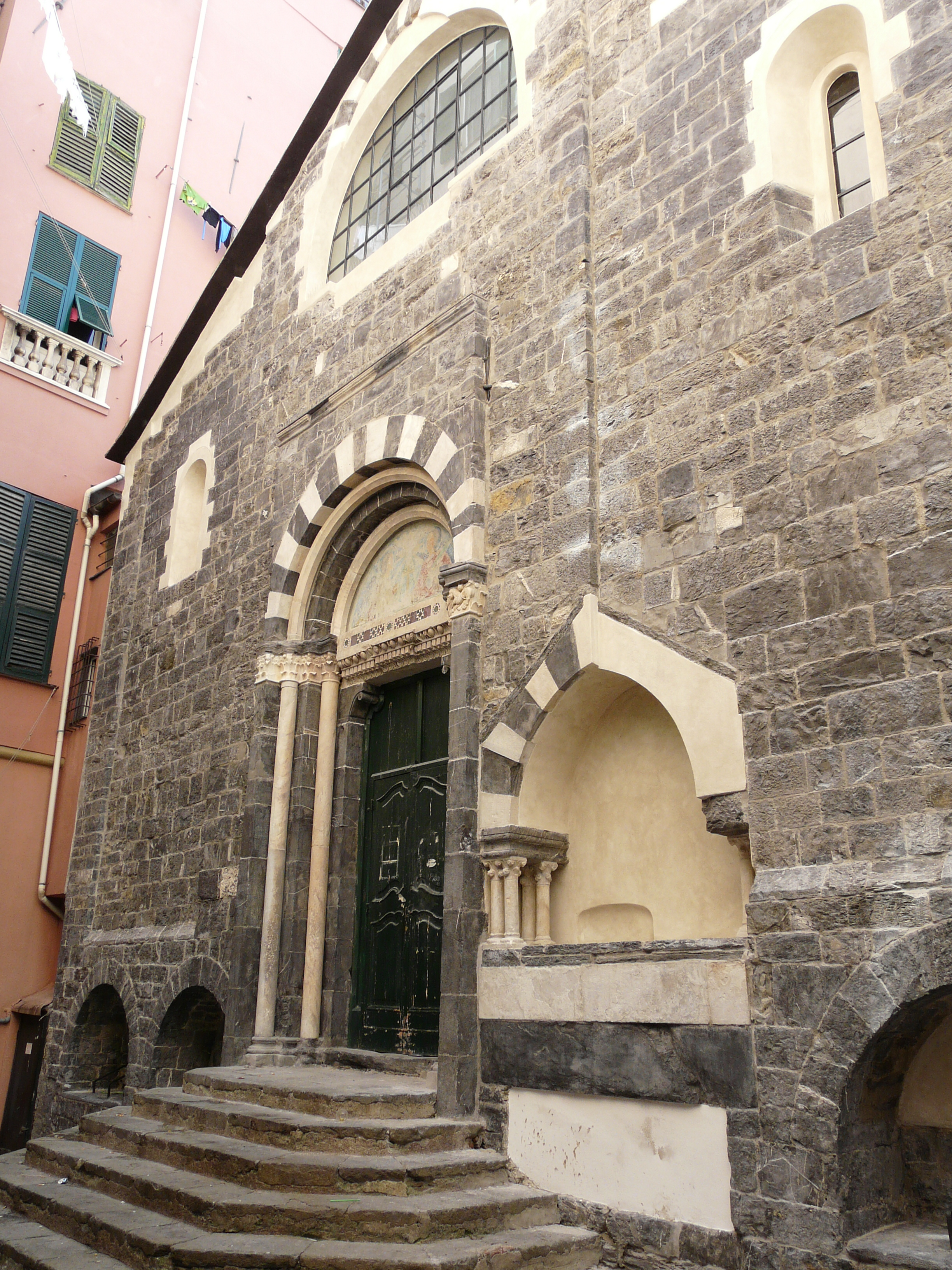 Chiesa dei Santi Cosma e Damiano, Genova, Liguria, Italia